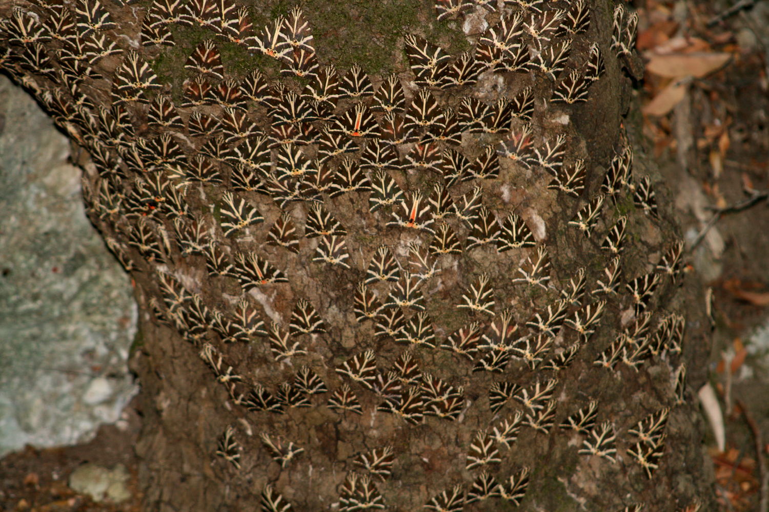 Butterflies Euplagia quadripunctaria, Rhodes island, Petaloudes, Valley of Butteflies Motýly přástevníci kostivaloví, ostrov Rhodos, Údolí motýlů, Petaloudes Date=August 2007 Author= Karelj